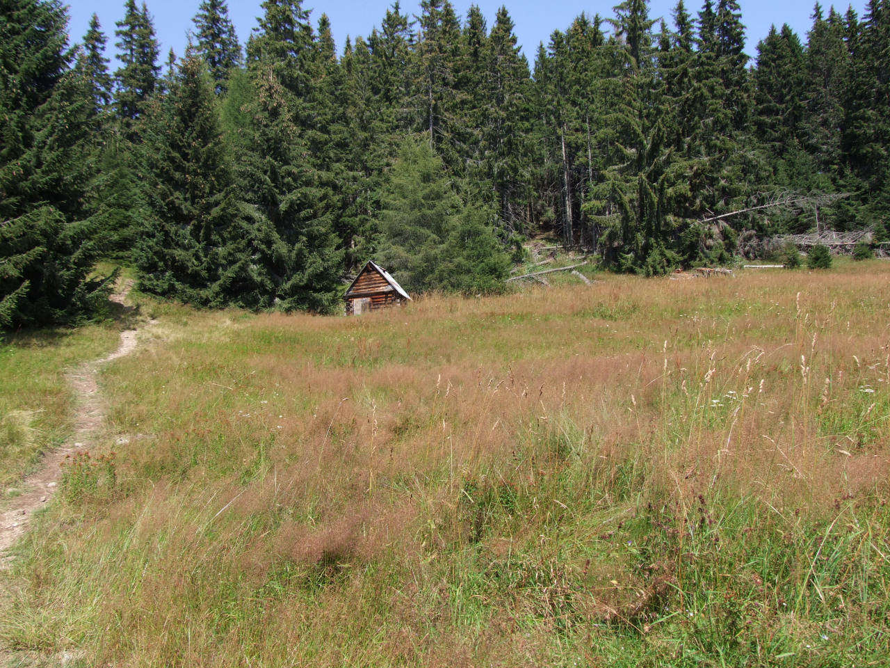 polana Horzyca (grzbiet Barańca, West Tatra Mountains))